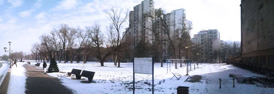 Pogled na zgradu Solidarnosti sa Smederevskog Dunavskog keja zimi.